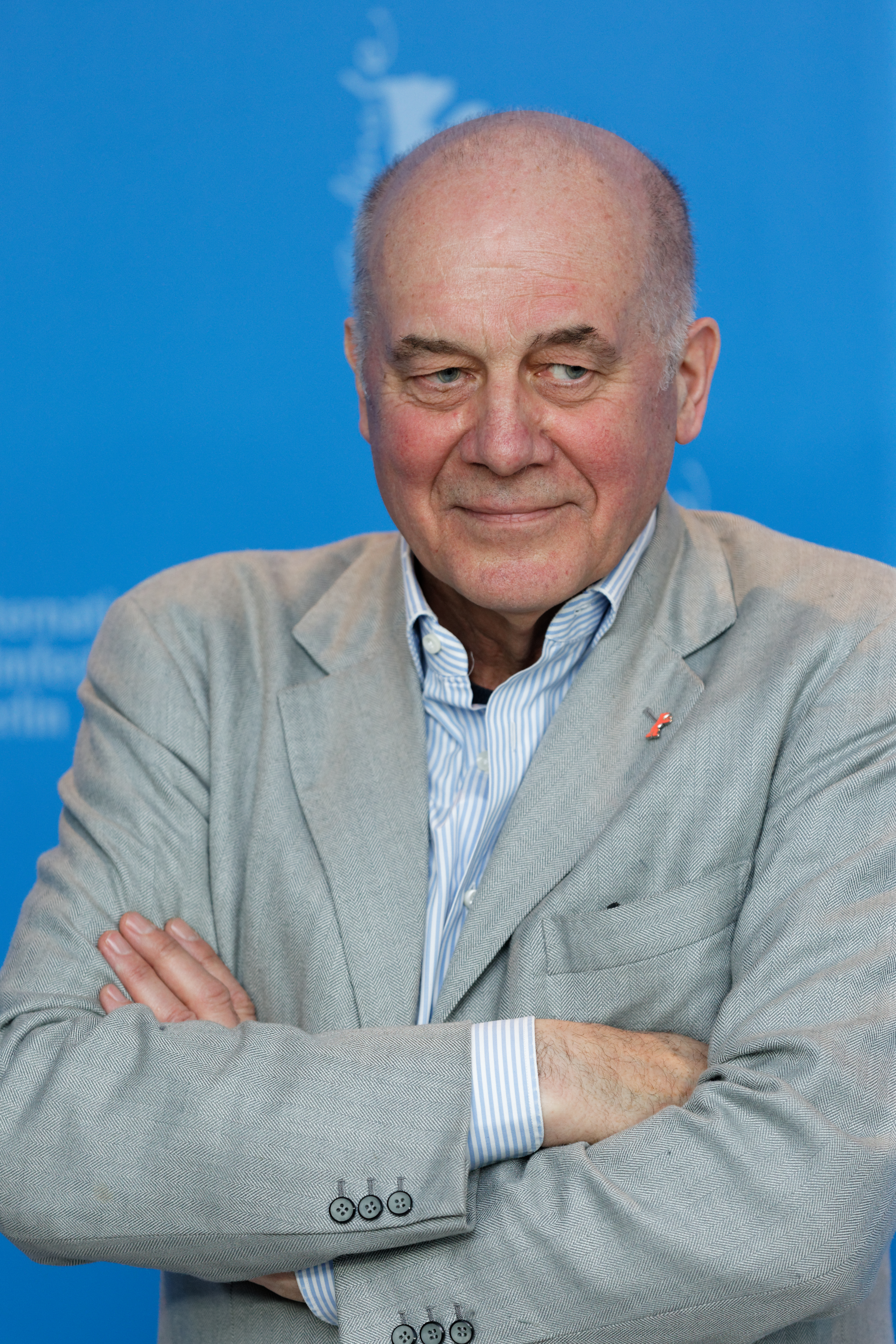 Hanns Zischler 67th Berlin International Film Festival, A Prominent Patient